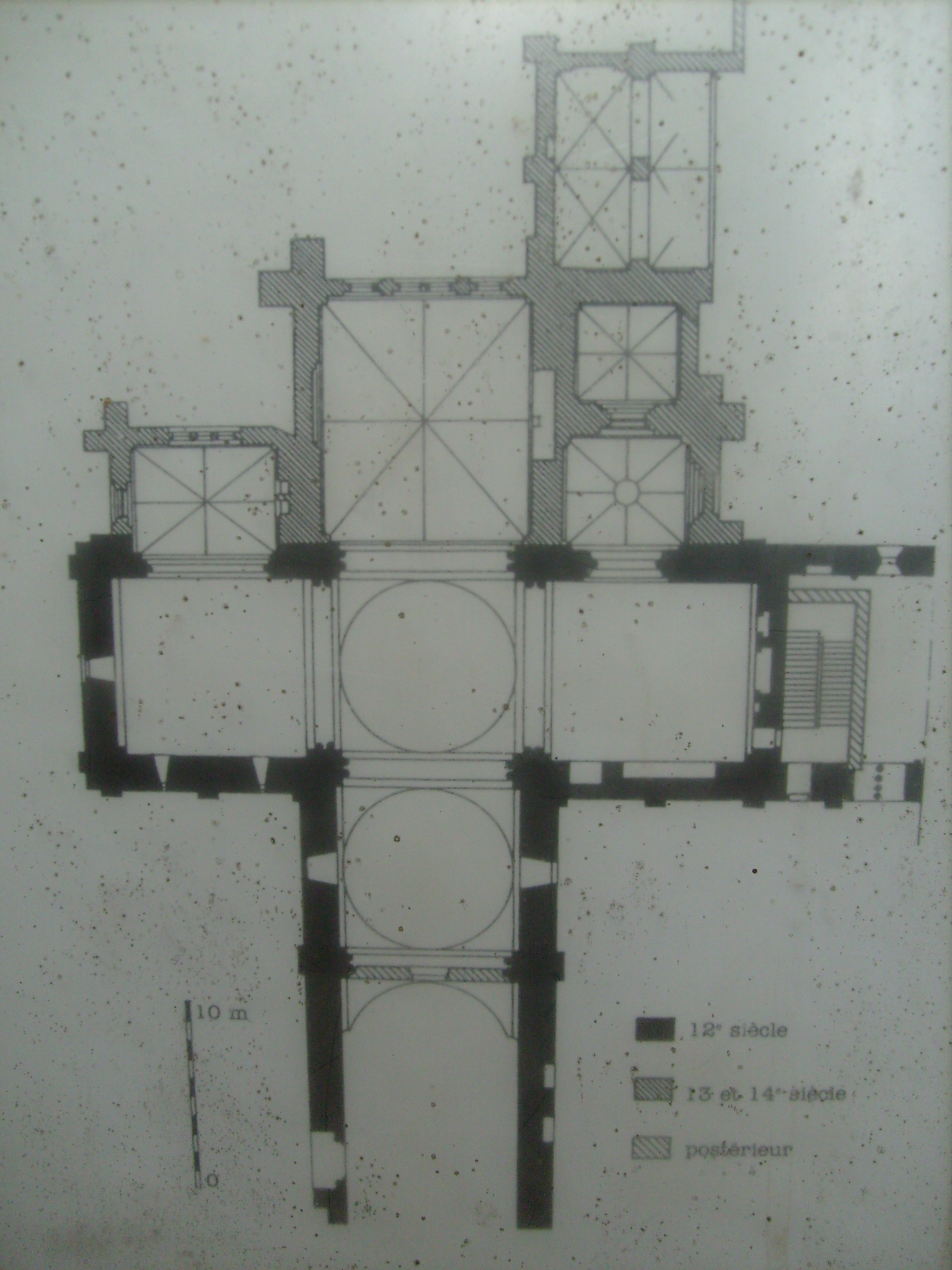 Plan de l'église de Sablonceaux